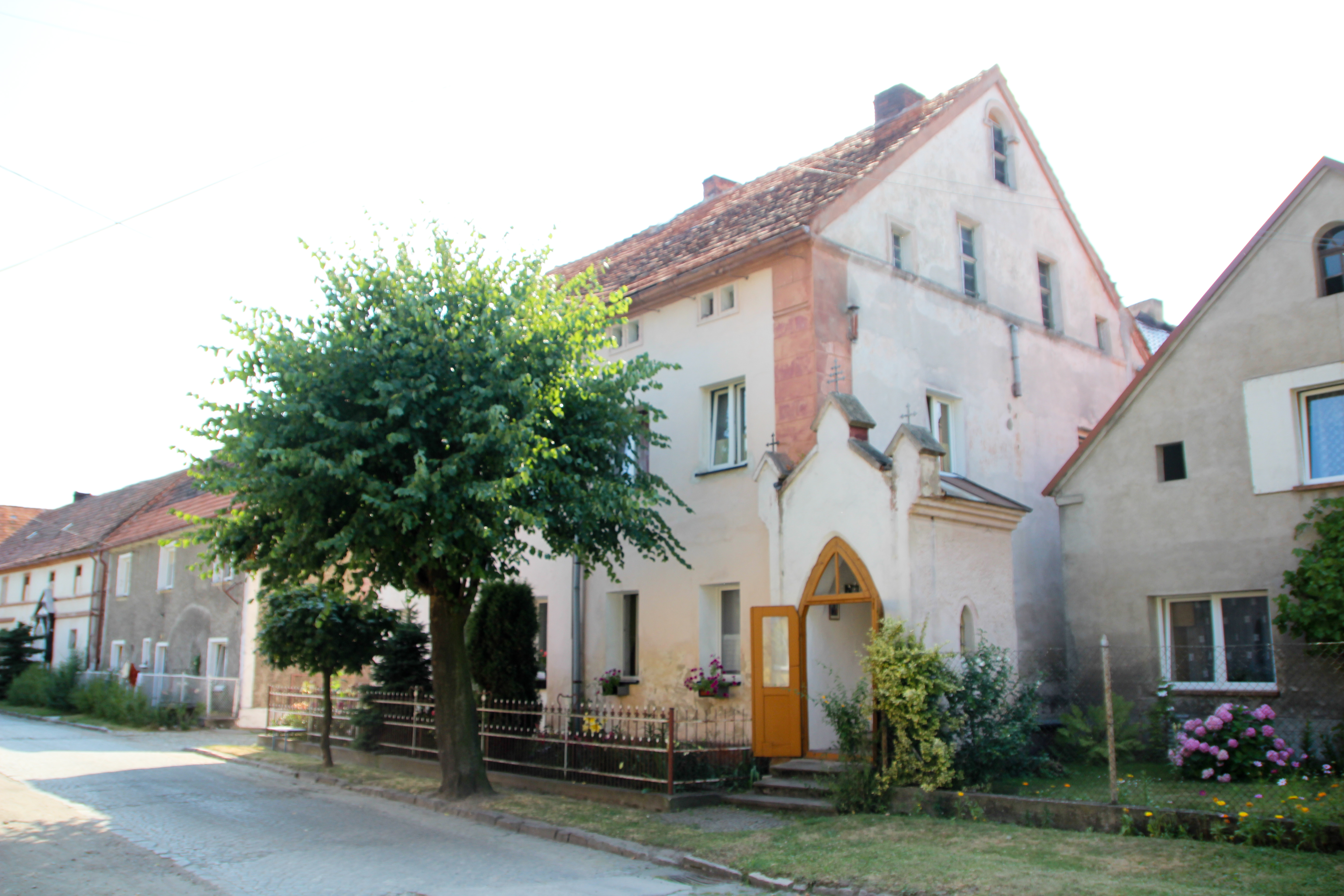 Wilamowa – wieś w Polsce, w województwie opolskim, w powiecie nyskim, w gminie Paczków.